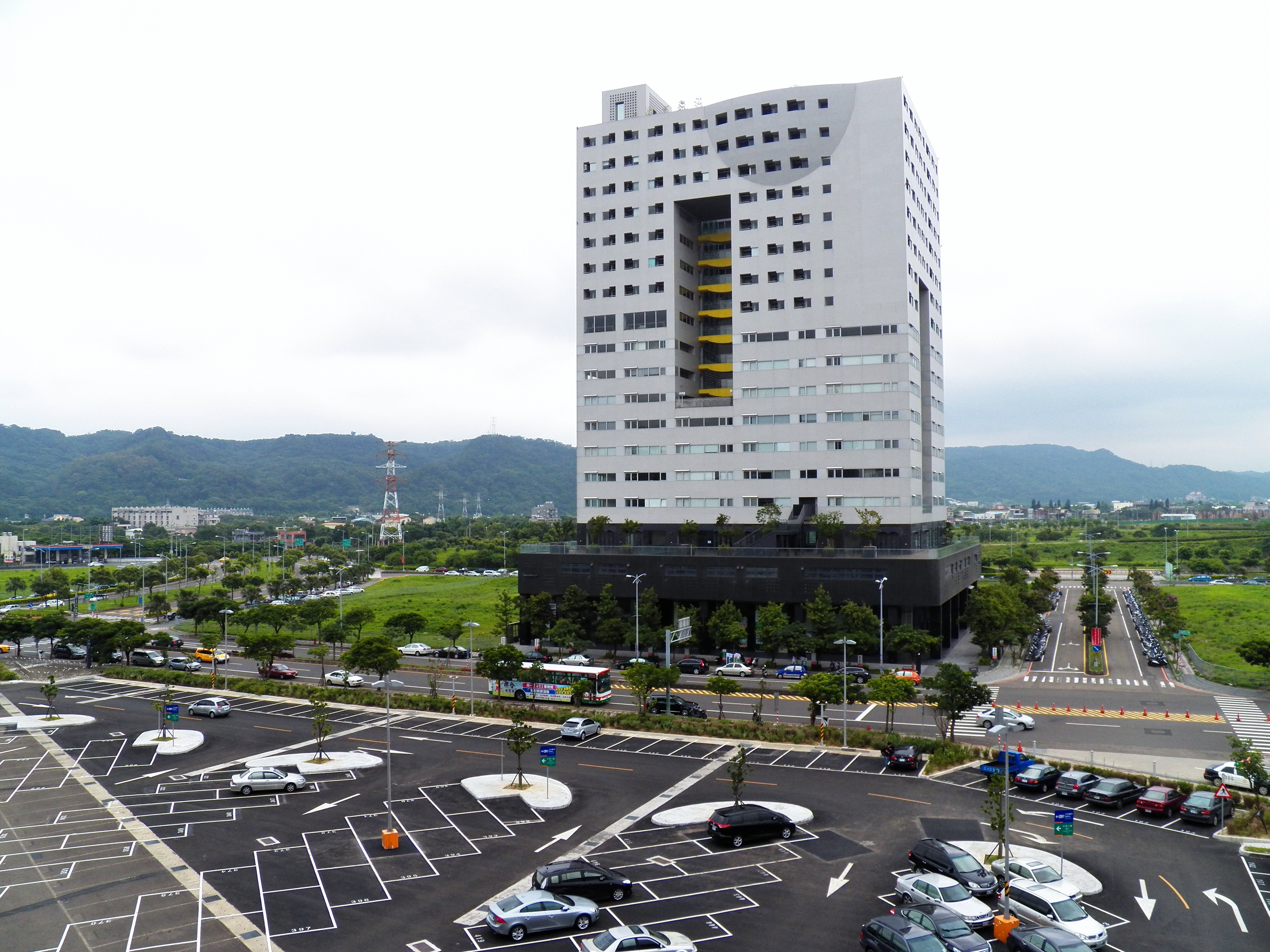 由台灣高鐵新竹站南下月臺東望惠友遠見商辦大樓（臺灣省新竹縣竹北市），原廣司設計。